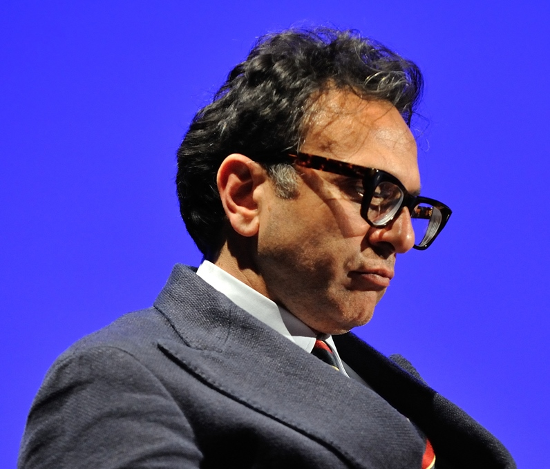 foto in primo piano